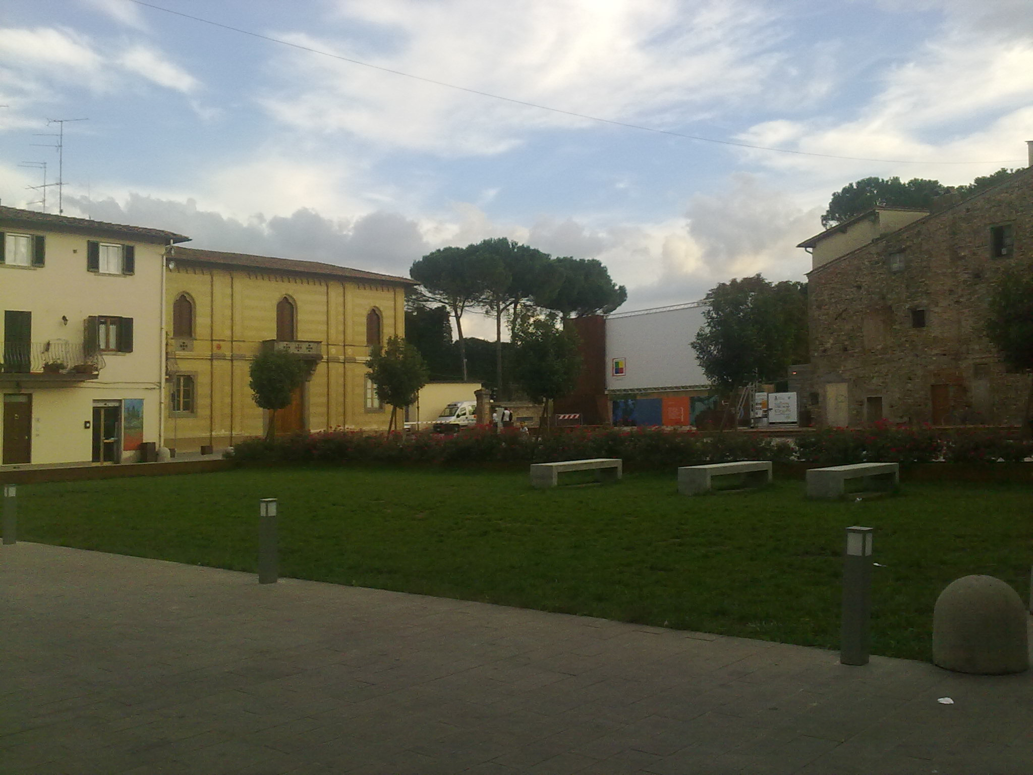 Piazza Garibaldi nel centro storico di Lastra a Signa